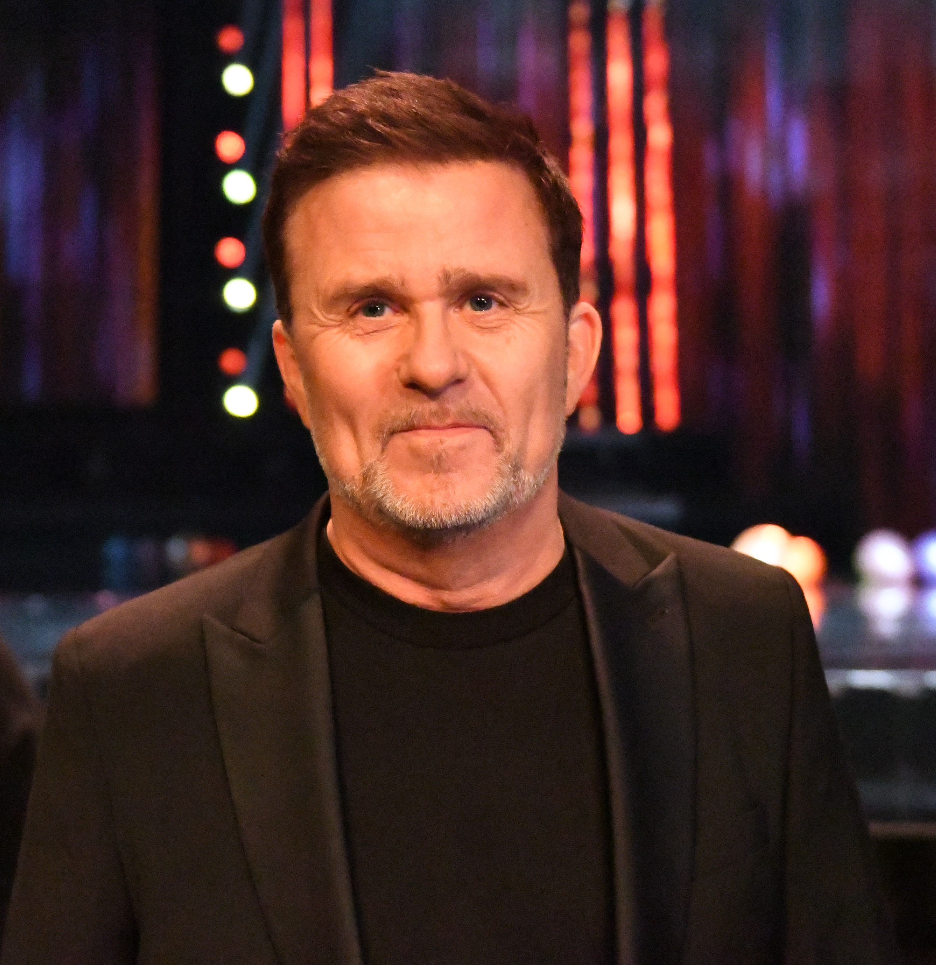 Melodifestivalen 2020, deltävling 2, Göteborg, Jan Johansen